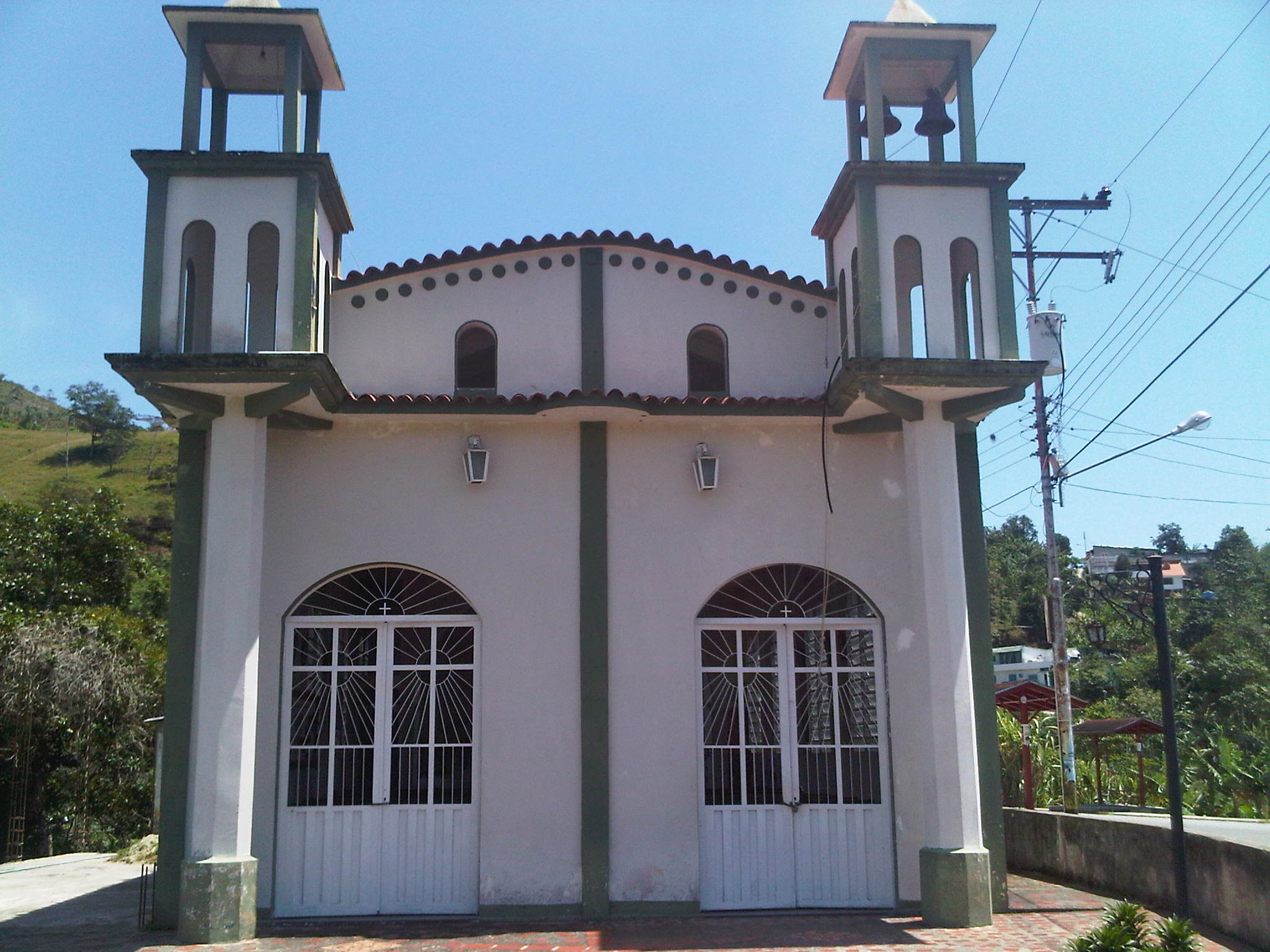 Iglesia de la Chiquinquira en la aldea de El Amparo, Municipio Tovar, estado Mérida, Venezuela